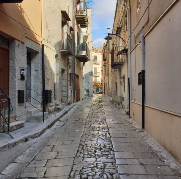 Via Prosfera a Piana degli Albanesi. Sulla sinistra la casa del sacerdote Papa Sepa Petta (1882 – 1959).